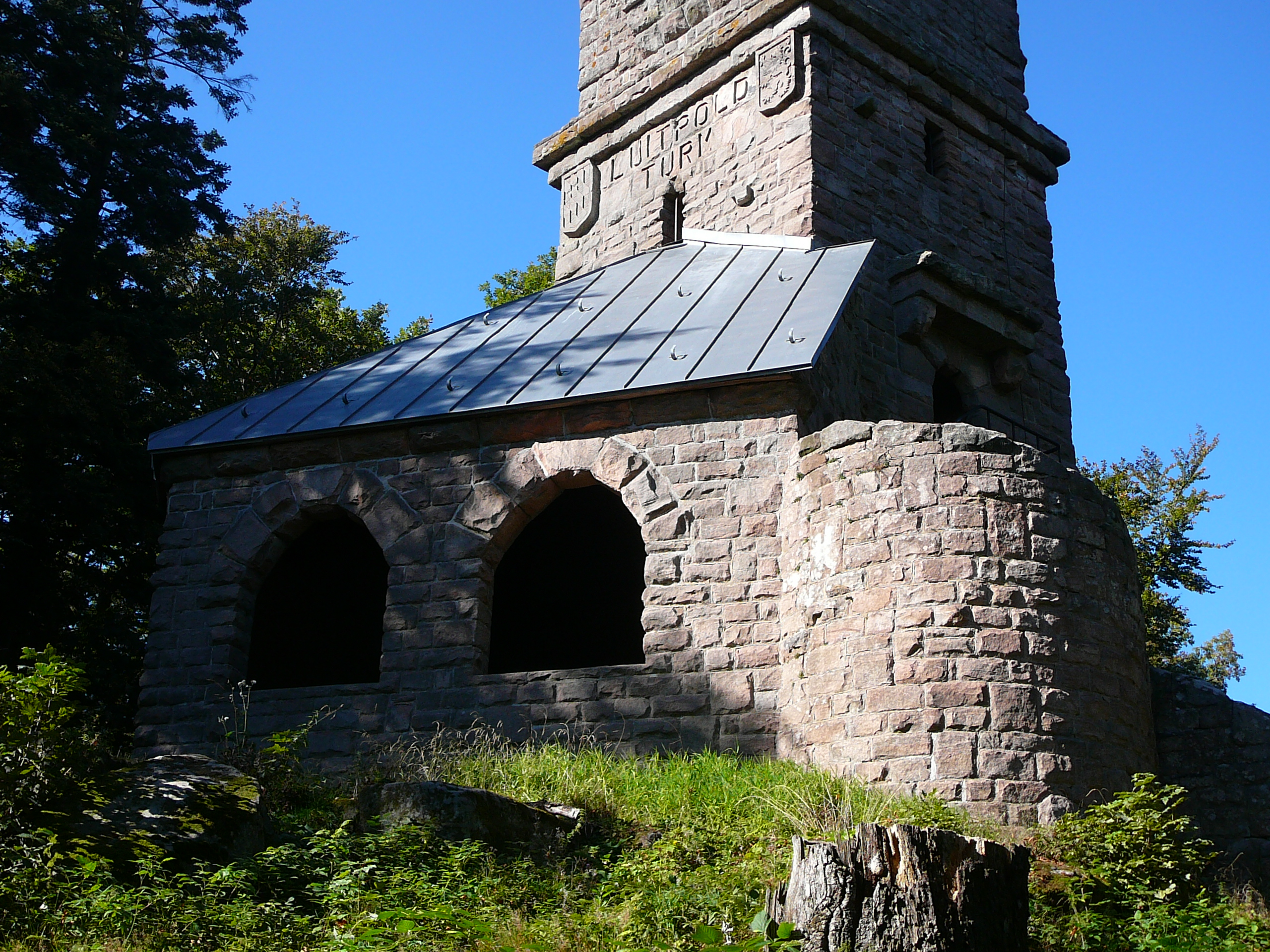 Luitpoldturm auf dem Weißenberg (Pfalz): Anbau mit Aufenthaltsraum